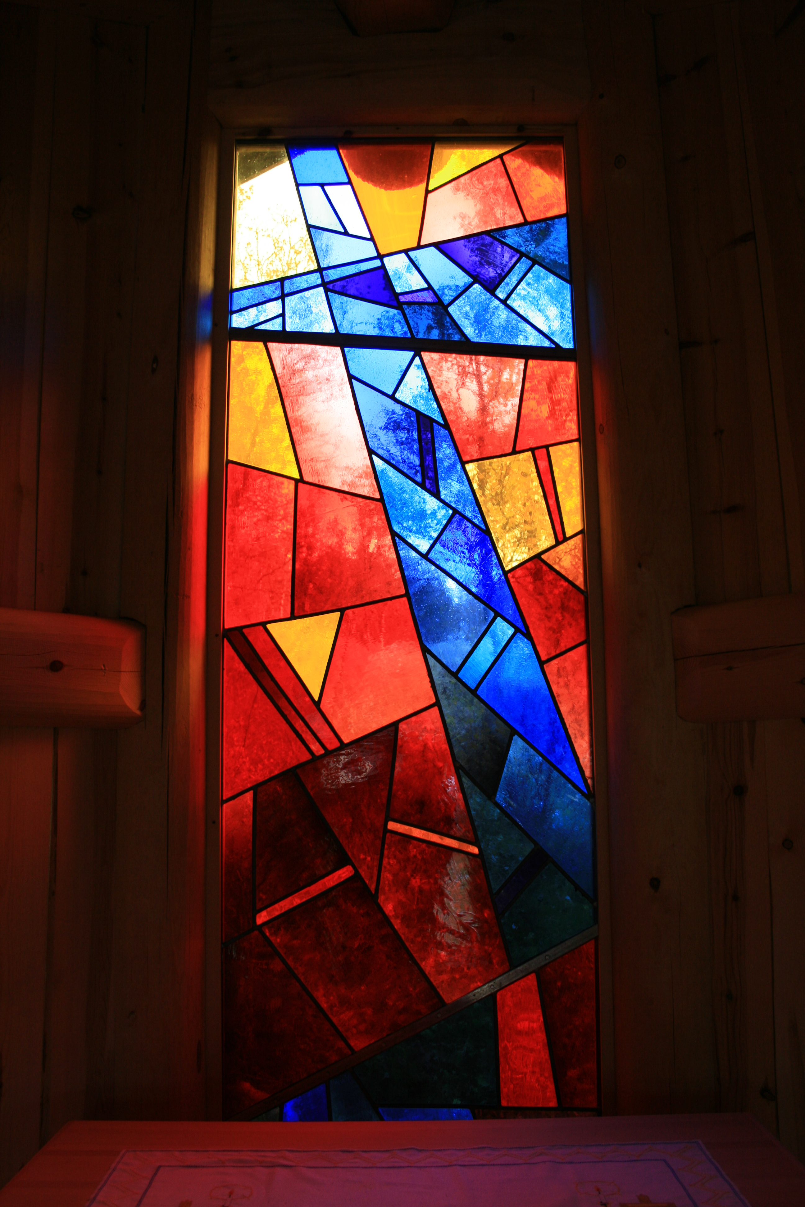 Interiørbilde fra Harahorn kapell, et kapell fra 1996 i Hemsedal kommune, Buskerud fylke, Norge.